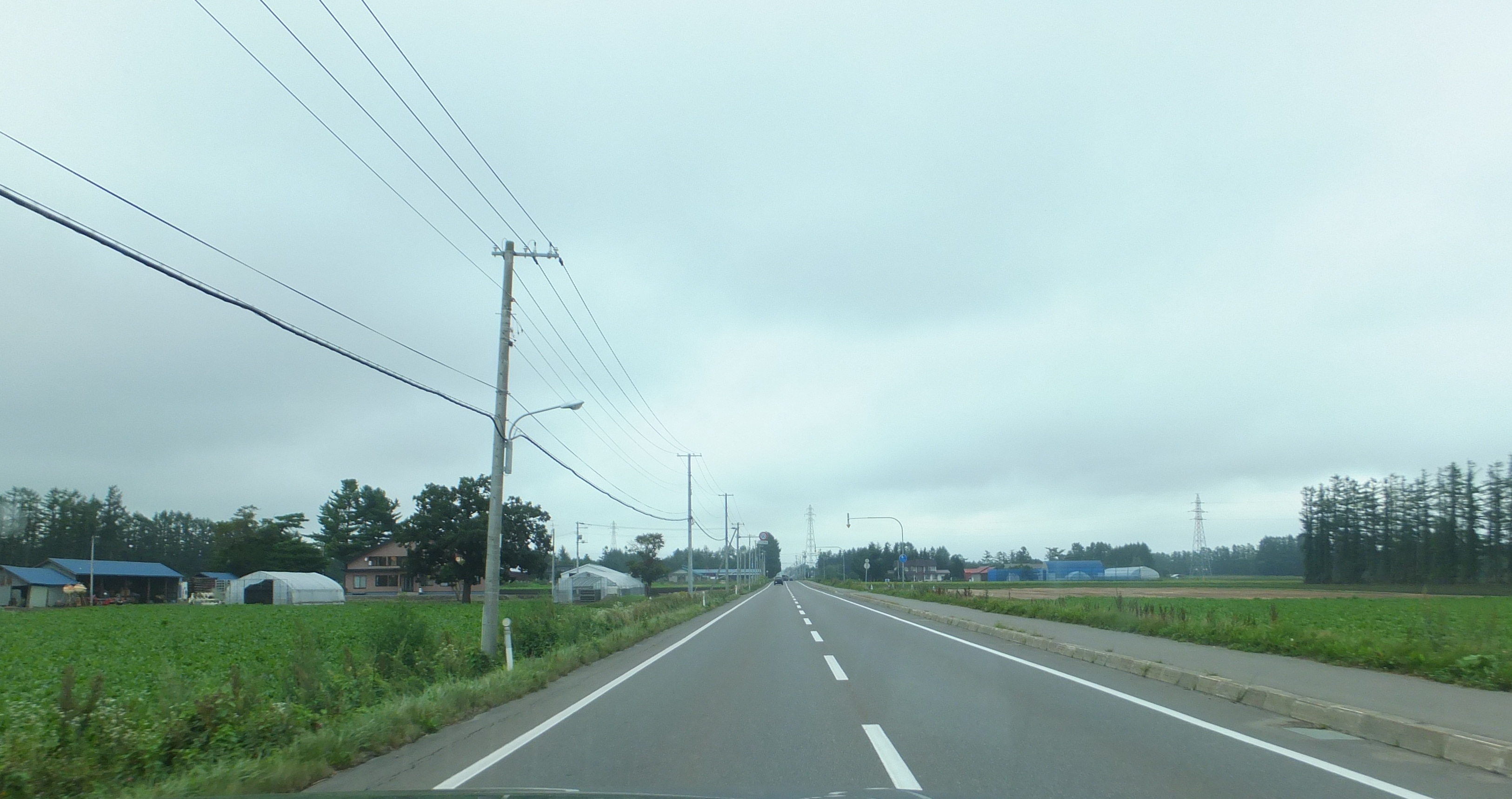 国道